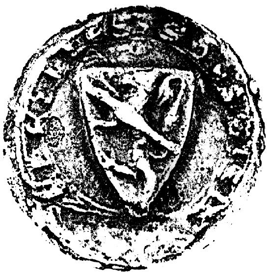 Sigel vum Simon von Kayl 1297